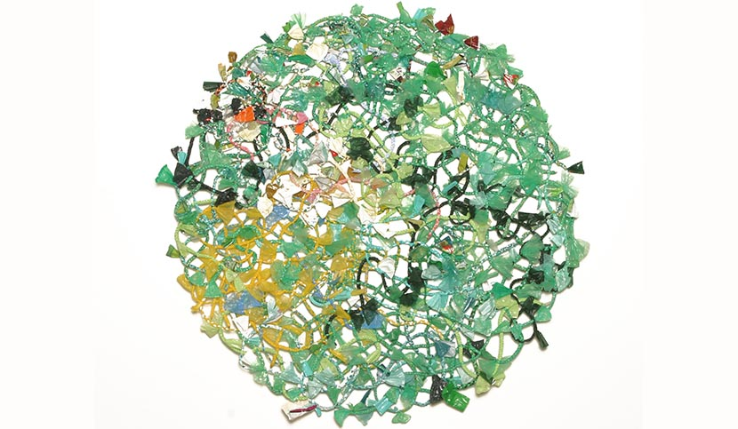 Sacs plastique tressés